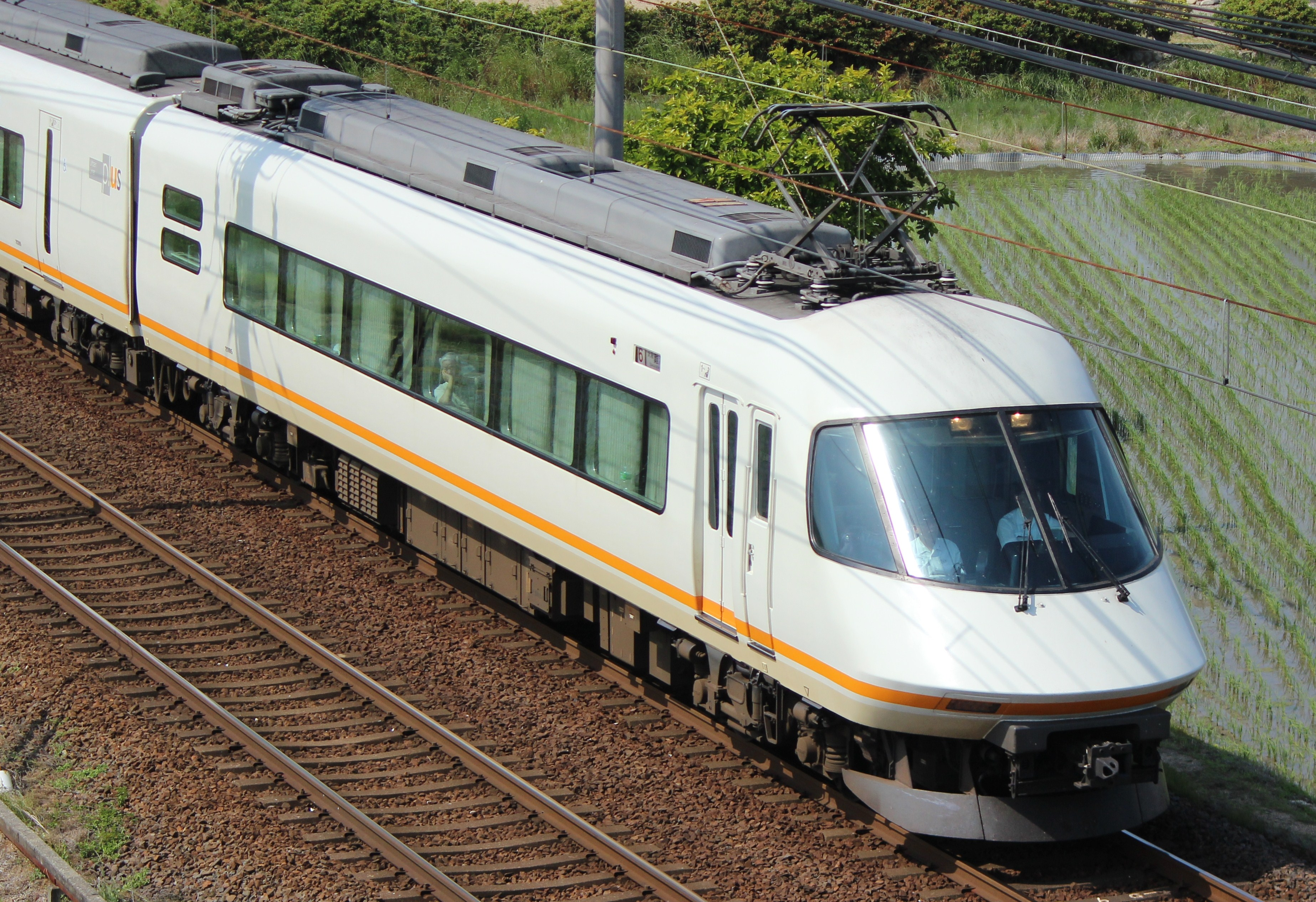 近鉄21000系更新車